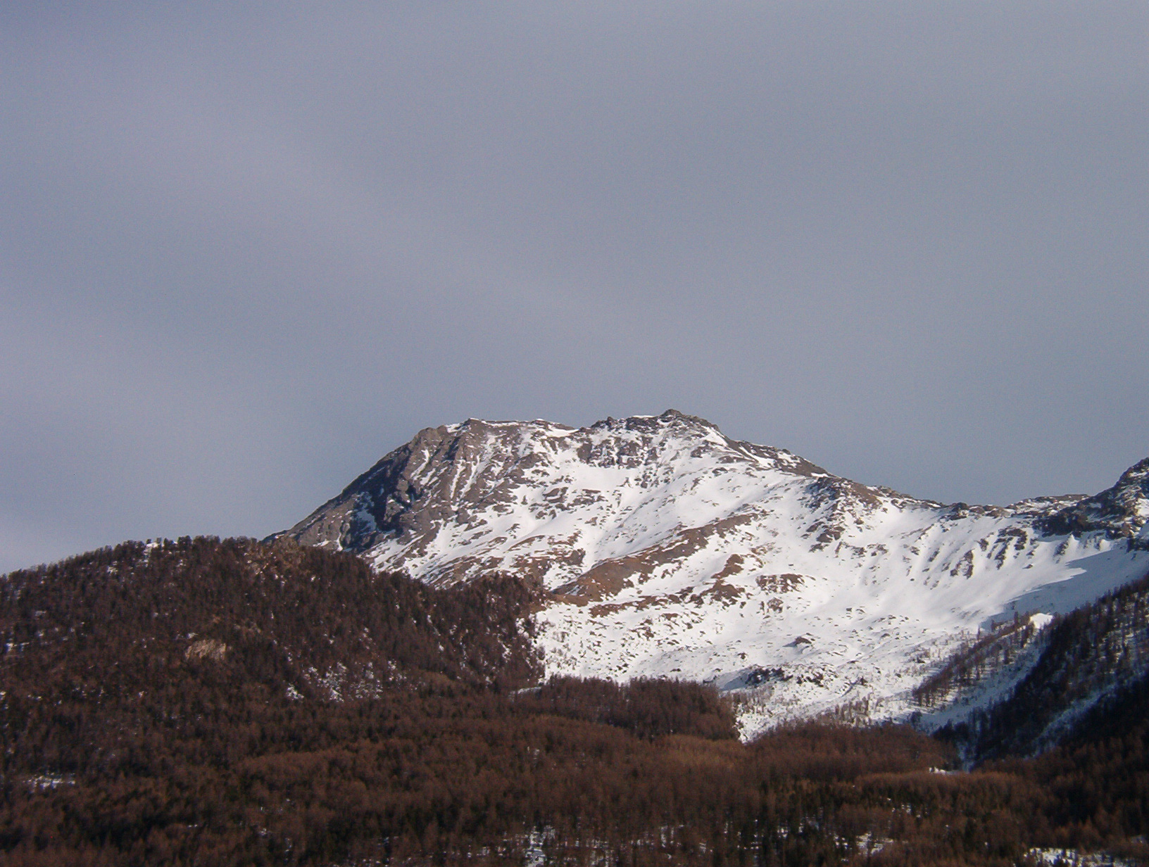 Monte Albergian visto dal Gran Puy (frazione di Pragelato) - Val Chisone - Piemonte - Italy